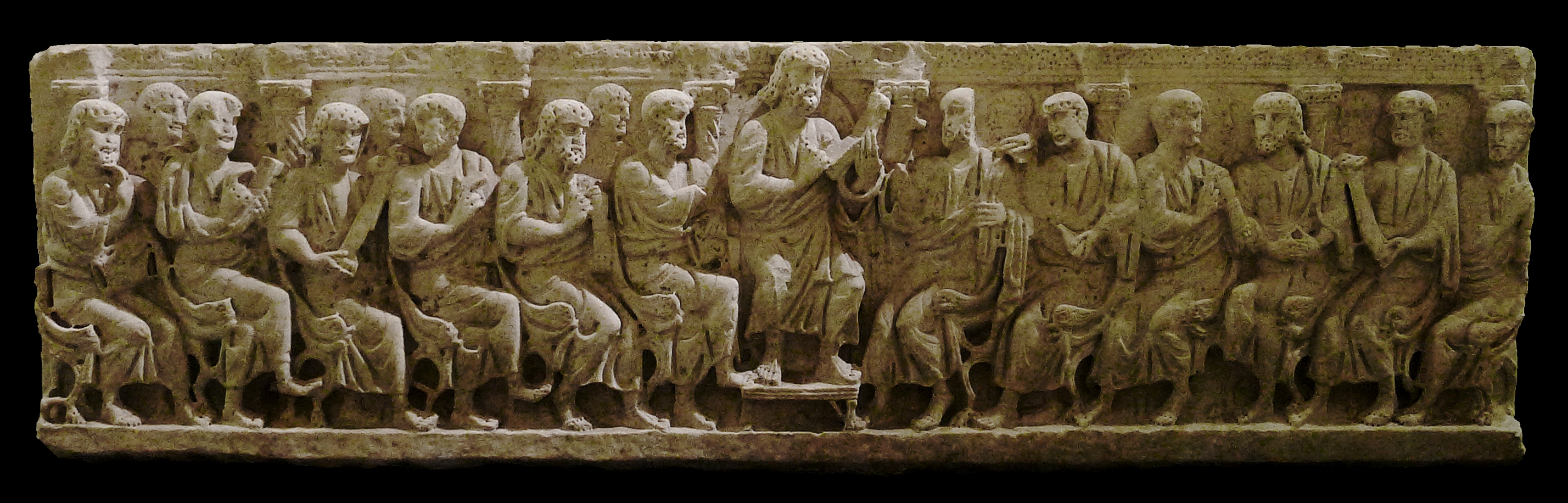 Sarcophage « scène d’enseignement ». Face principale : le Christ trônant au centre enseigne aux apôtres.